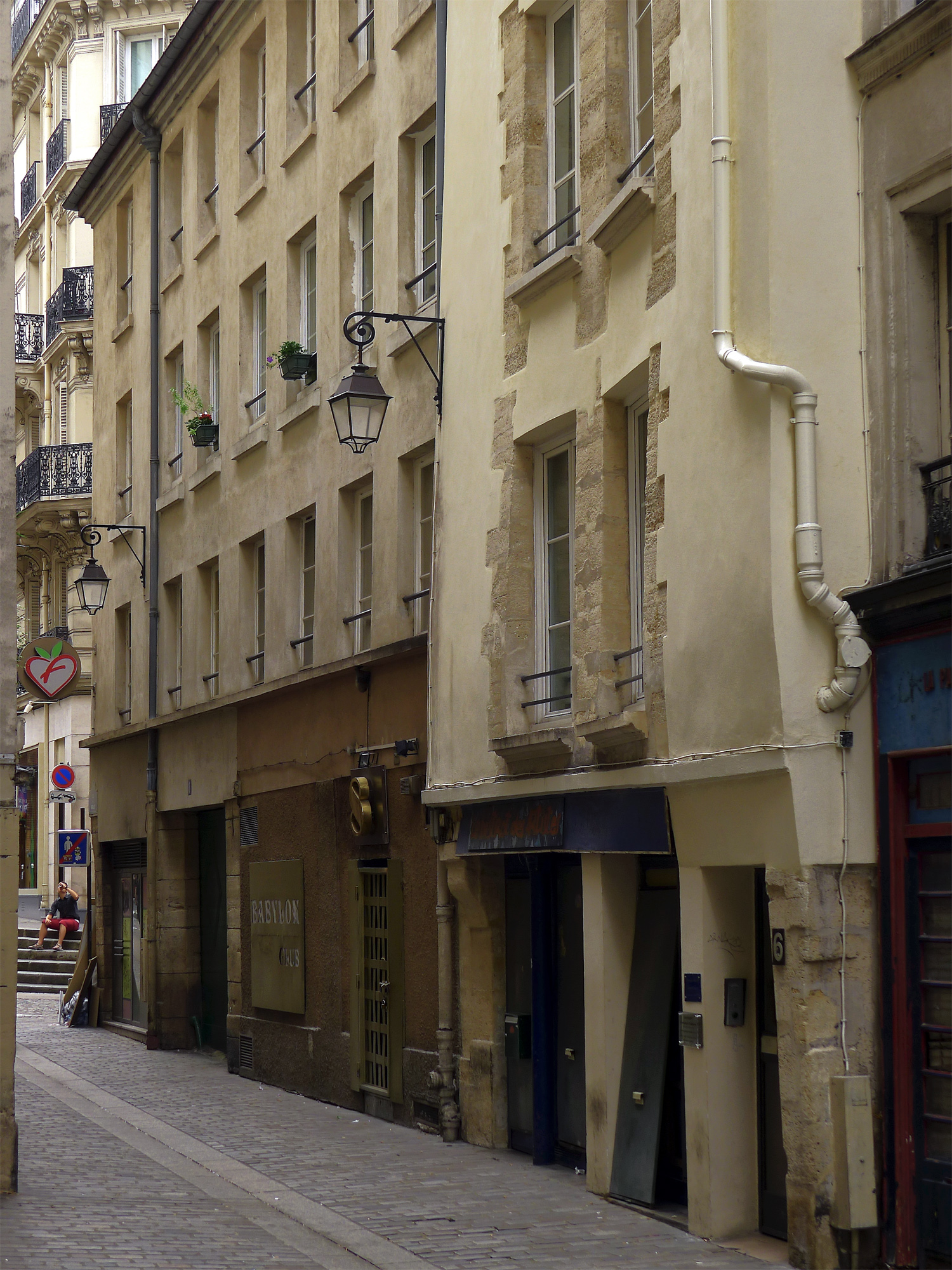 Rue des Anglais - Paris V